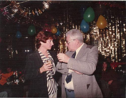 he:יעקב בן-הרצל וhe:רחל הרמתי במסיבת פורים של עובדי "קול ישראל", 1984